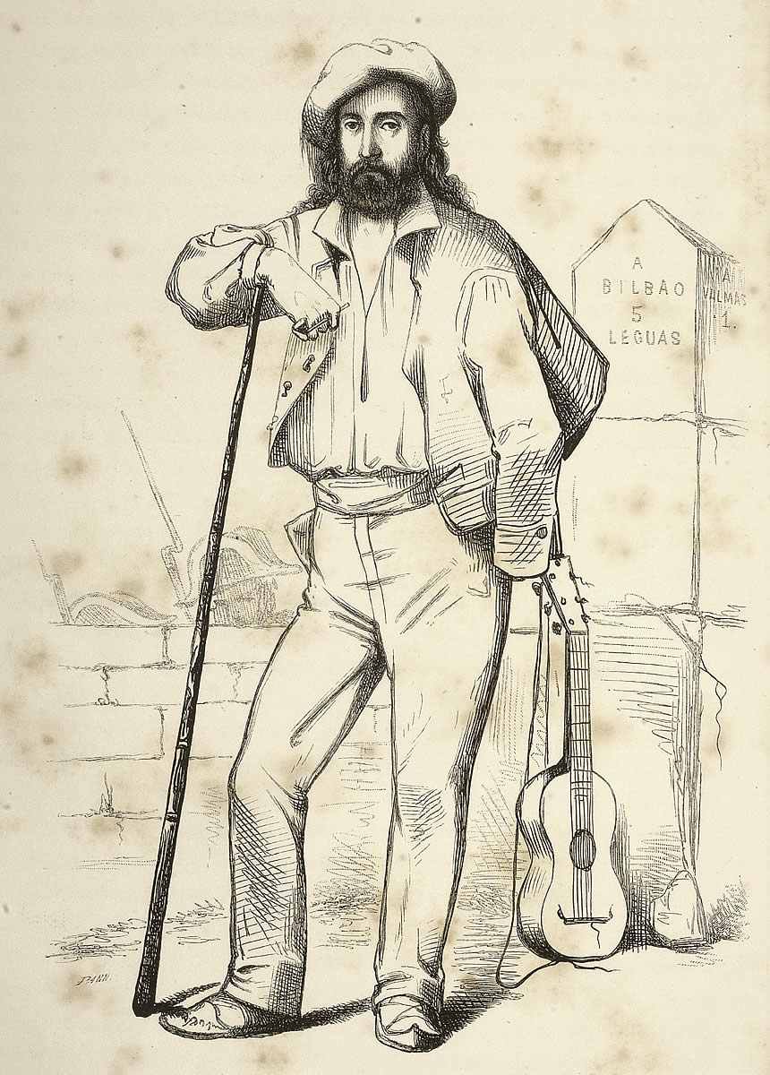 Izenburua: Jose Maria Iparragirre : herri kantaria, Gernikako Arbola zortzikoaren egilea Dokumentua: 730 Egilea: Bringas Grabatzailea: Pannemaker Inprimategia: Imprenta de Jaime Jepus Roviralta, Barcelona Liburua/Albuma: Oasis, el : viaje al pais de los fueros Euskarri data: 1879 Azalpen fisikoa: Grabatua, 27 x 18 cm-koa, 34 x 25 cm-ko orrian. Notak: Liburuaren egilea: Joan Mañe y Flaquer. Bringasek lumaz egindako erretratu batean oinarritutako grabatua. Autografiatua. Materiak: Artea eta Arkitektura-Pintura-Erretratuak Aisia-Jantziak Aisia-Musika-Musika tresnak Pertsonaiak: Iparragirre, José María Signatura: ZM : Z,3 - TOMO II - PAG. 358 - PAG. 359 Kokapena: Museo Zumalakarregi Museoa